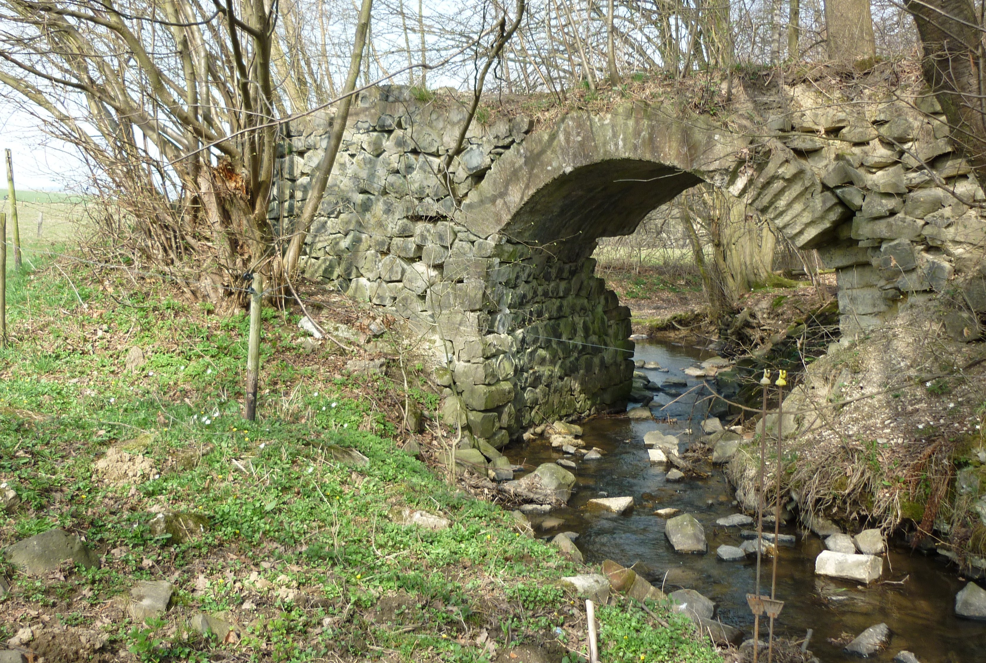 Quirrenbach, ehemalige Bahnüberführung (Steinbogen aus Basalt) nahe der Irlenstraße, Wülscheid, Aegidienberg